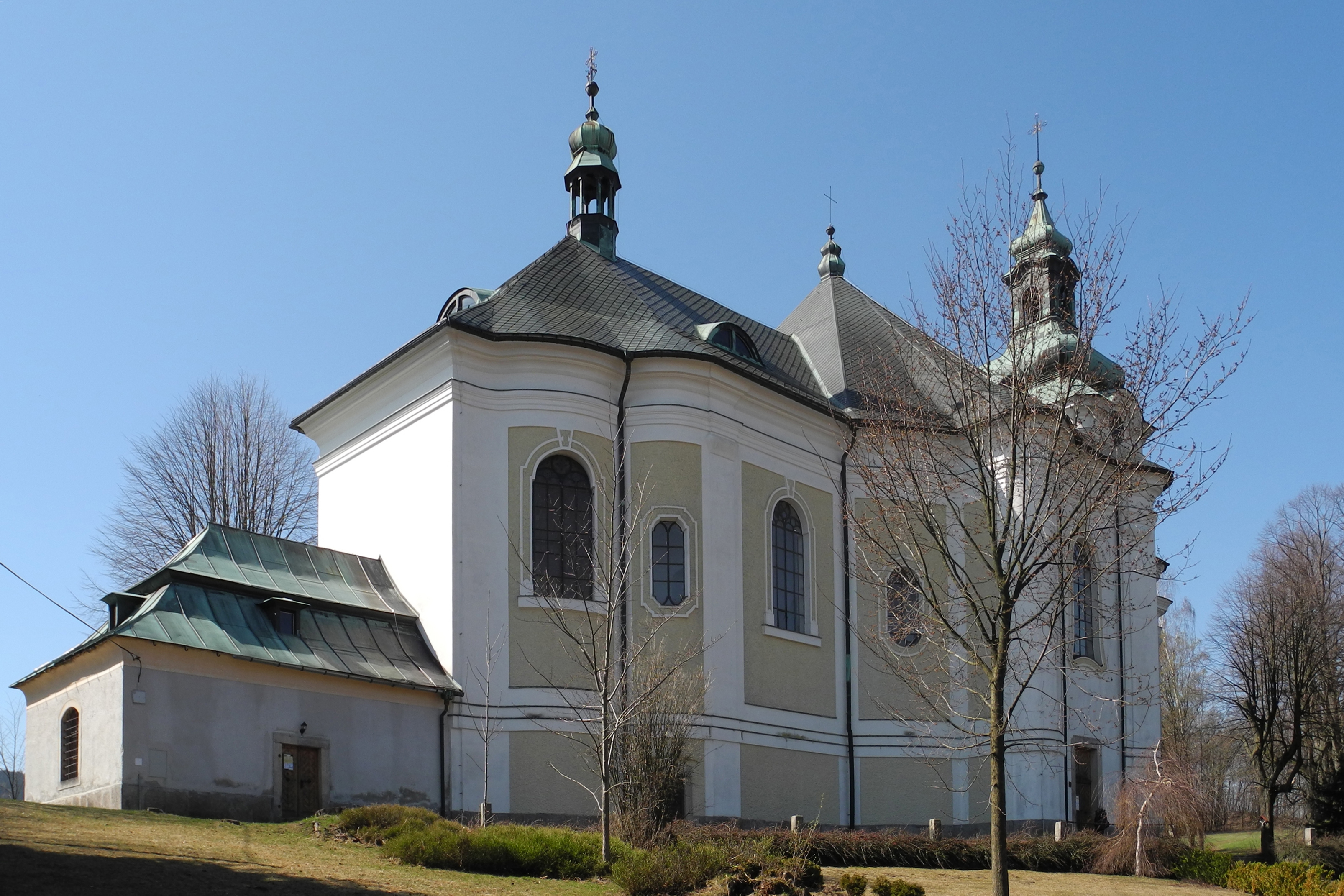 Kirche des hl. Erzengel Michael in der Stadt Morchenstern - Smržovka